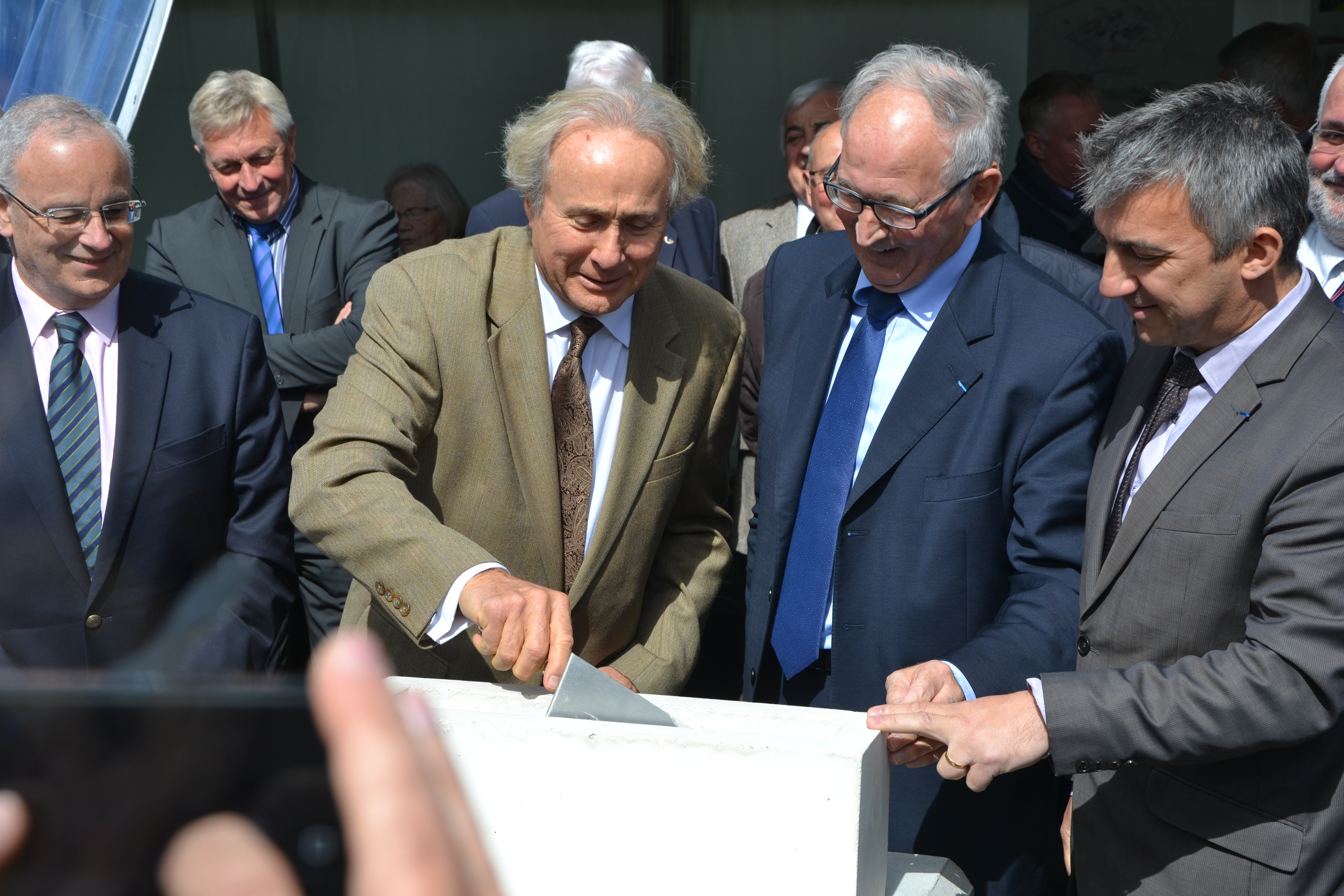 Michaël Reagan, fils de Ronald Reagan qui pose la première pierre